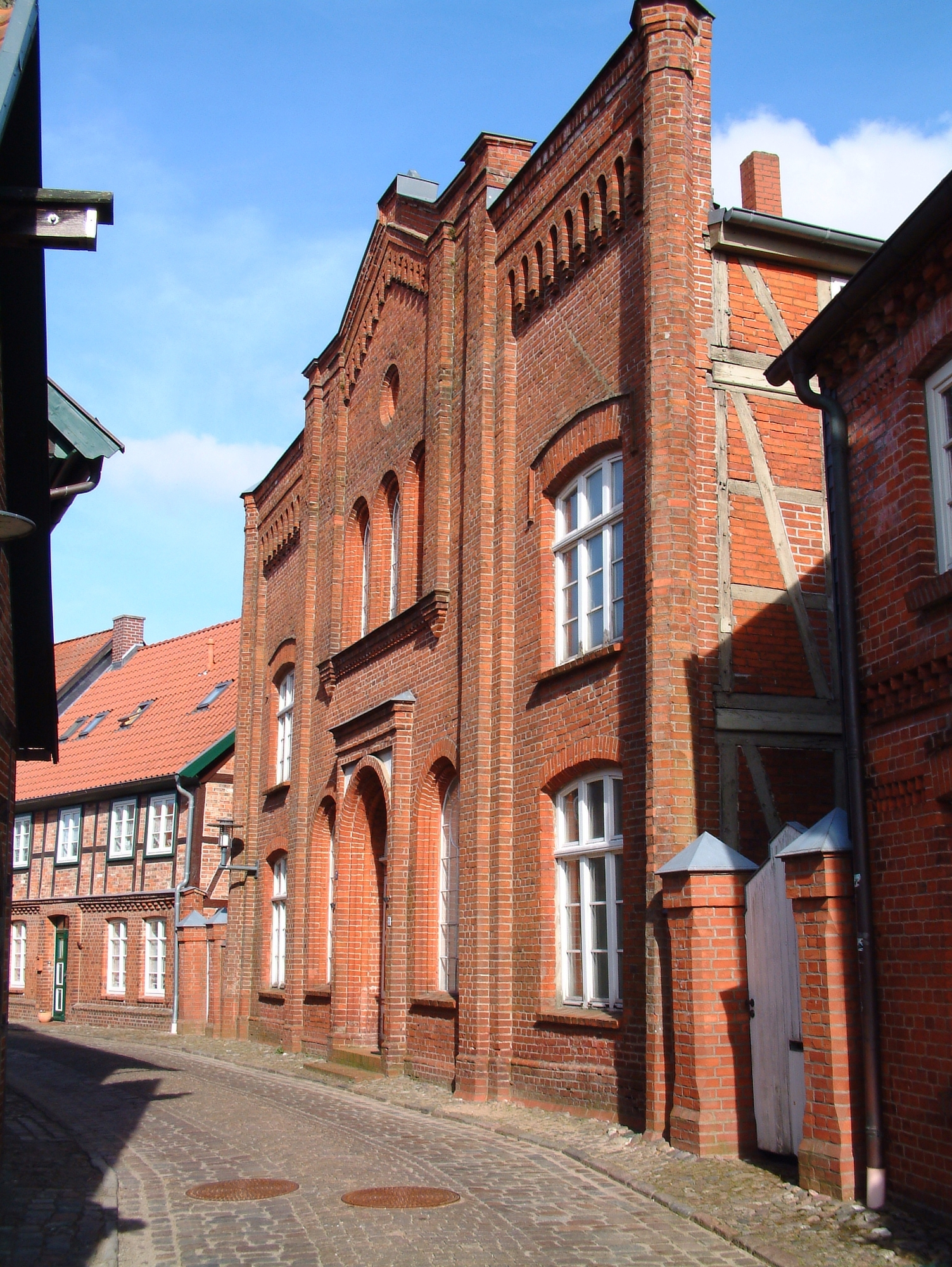 Synagoge in Boizenburg Elbe